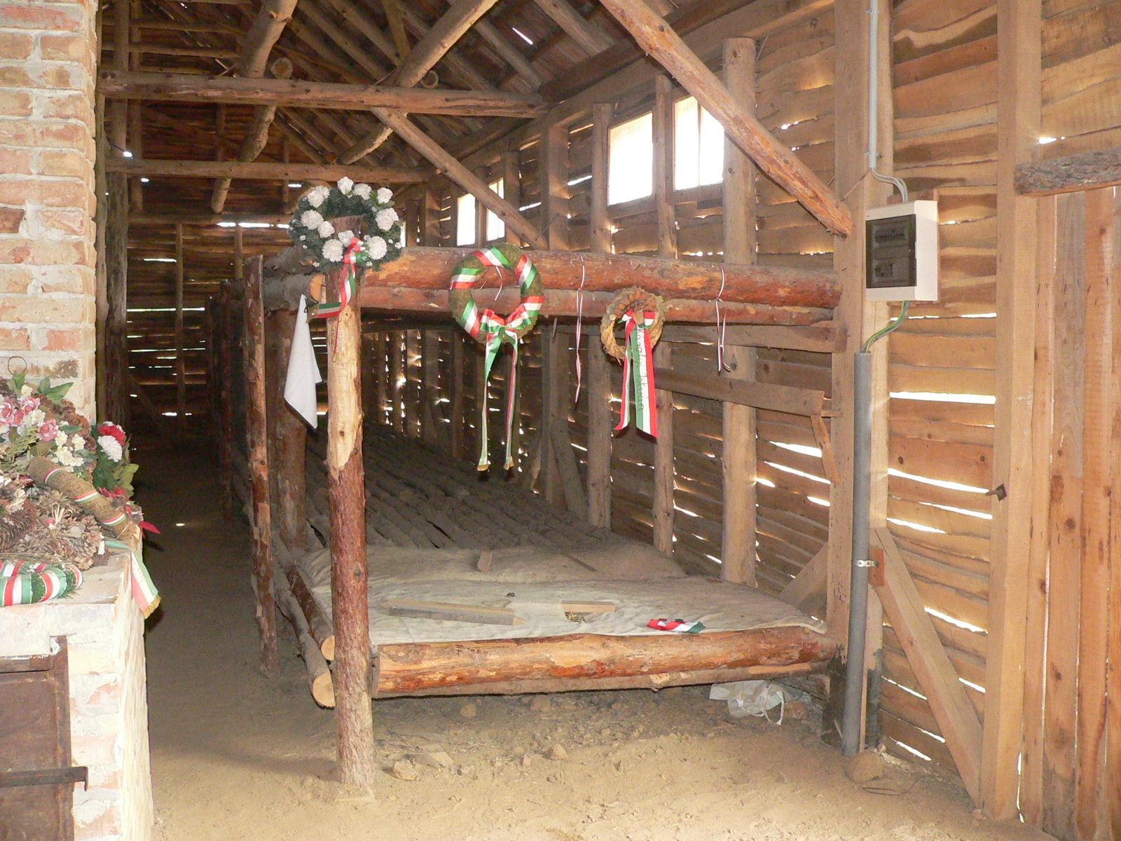 A barakk belső tere Recsken